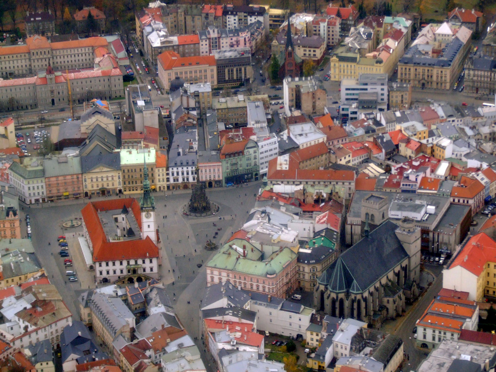 Olomouc, letecký pohled na centrum